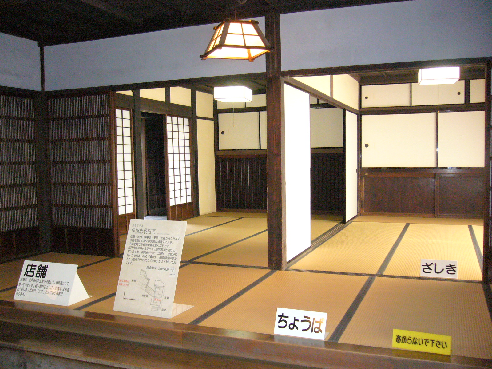 ino-tadataka-house-mise,katori-city,japan